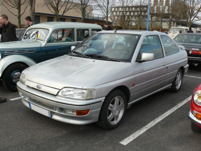 Reims 2012